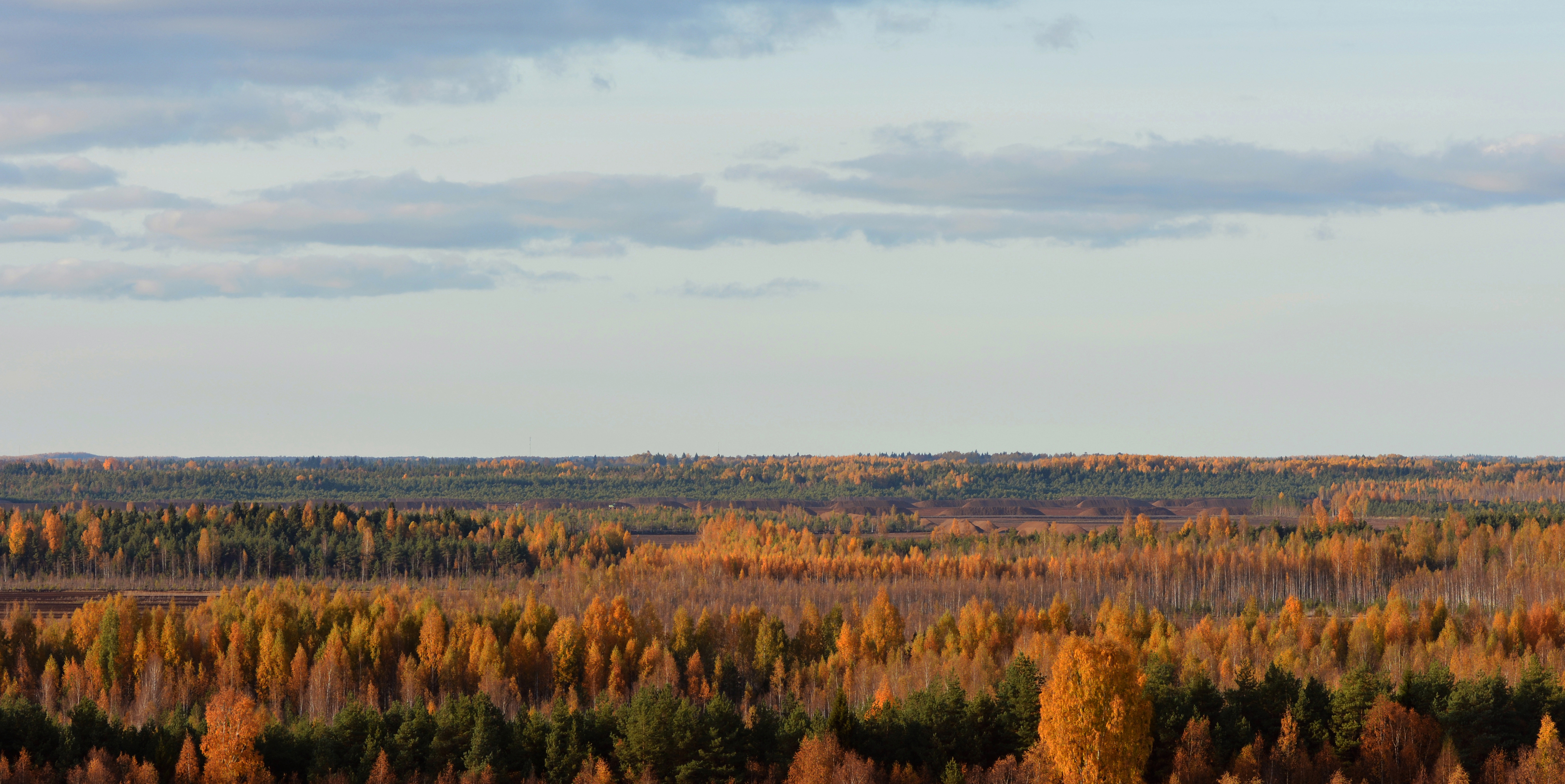 Järvamaa